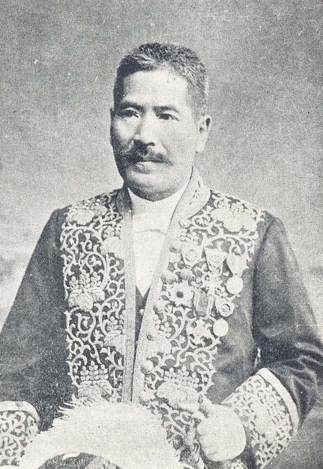 村上義雄 Murakami Yoshio